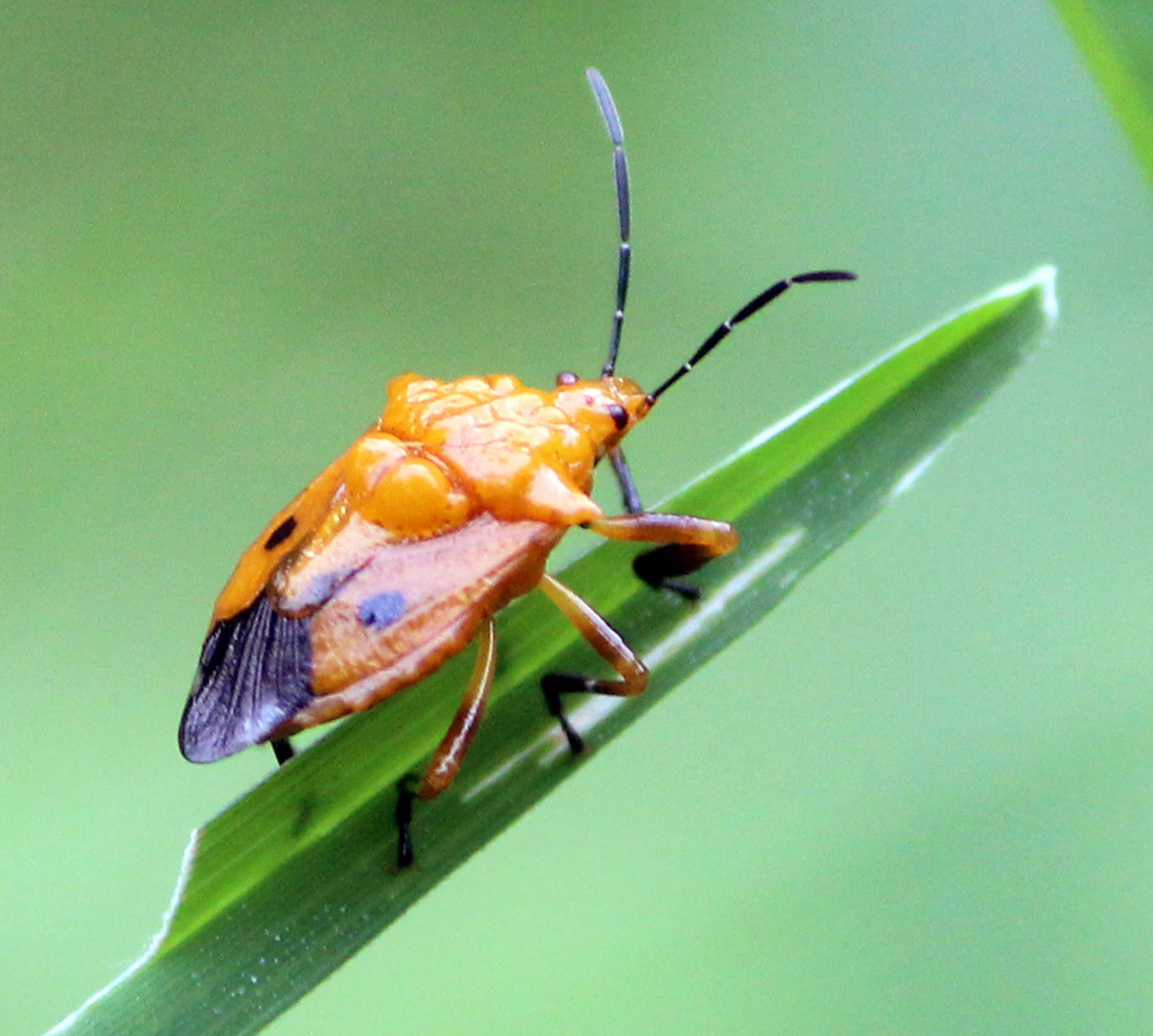 Cazira sp.,Shield bug - Pentatomidae